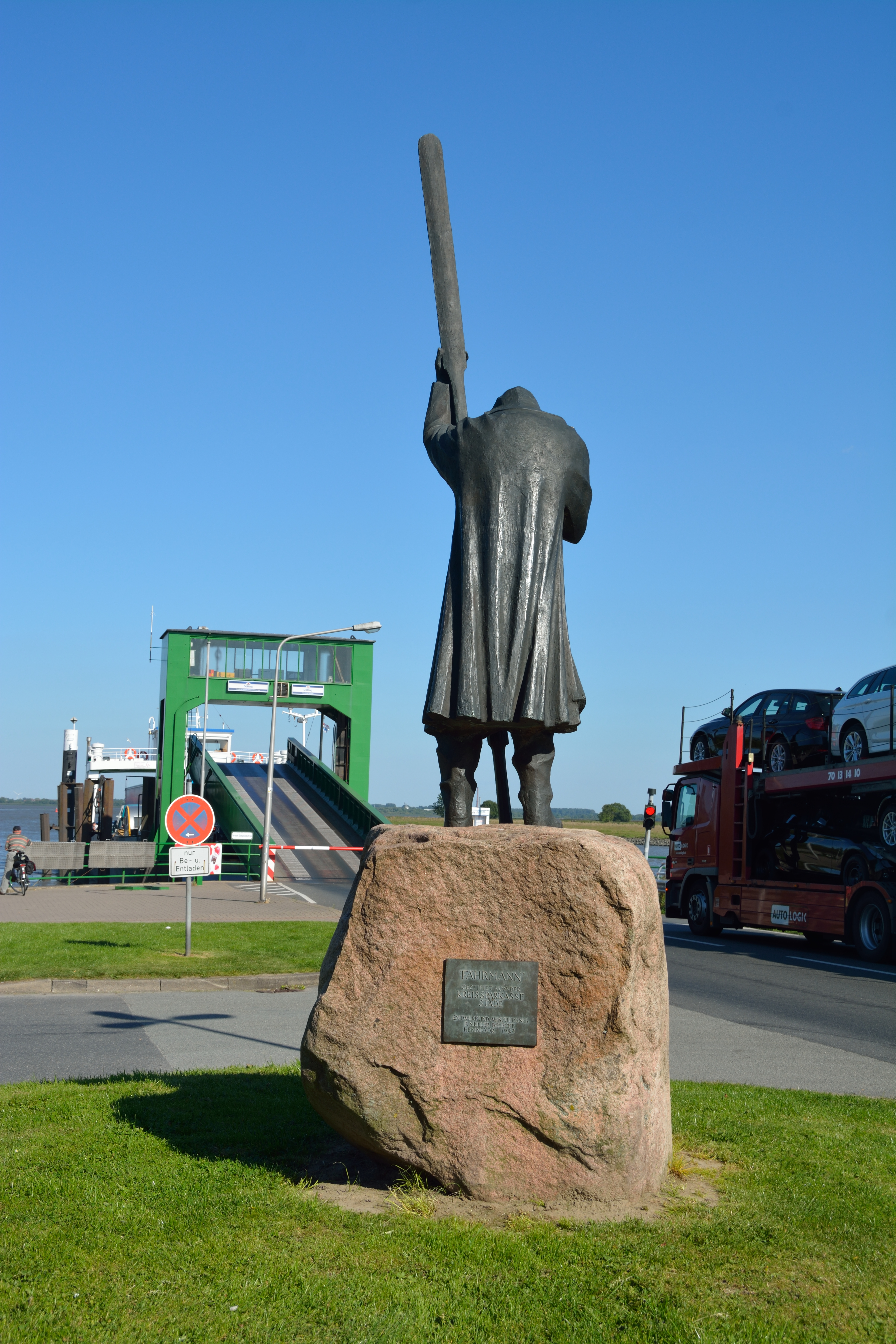 Impressionen einer Hin- und Rückfahrt über die Elbe.